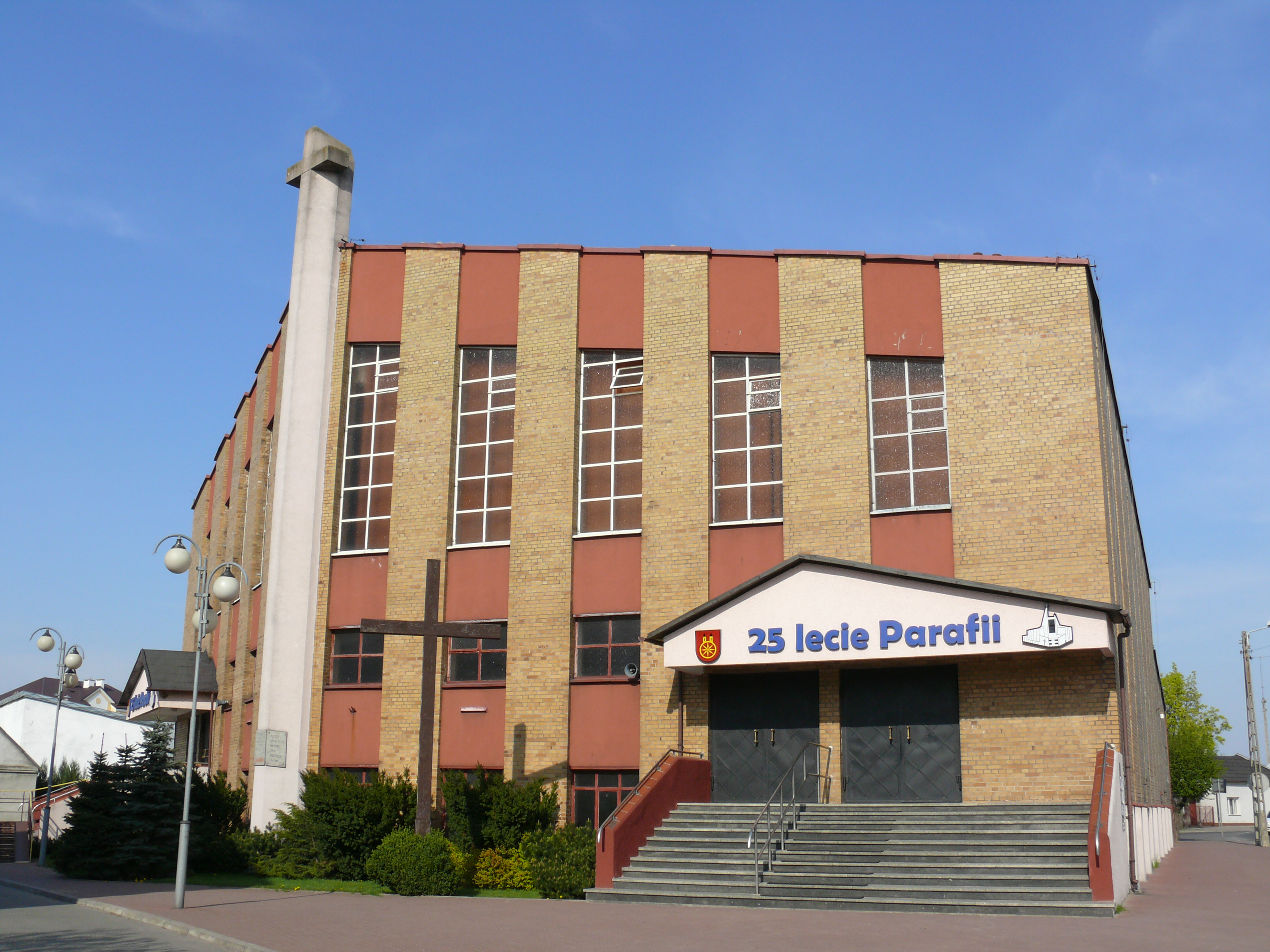 Kościół MB Częstochowskiej w Kole